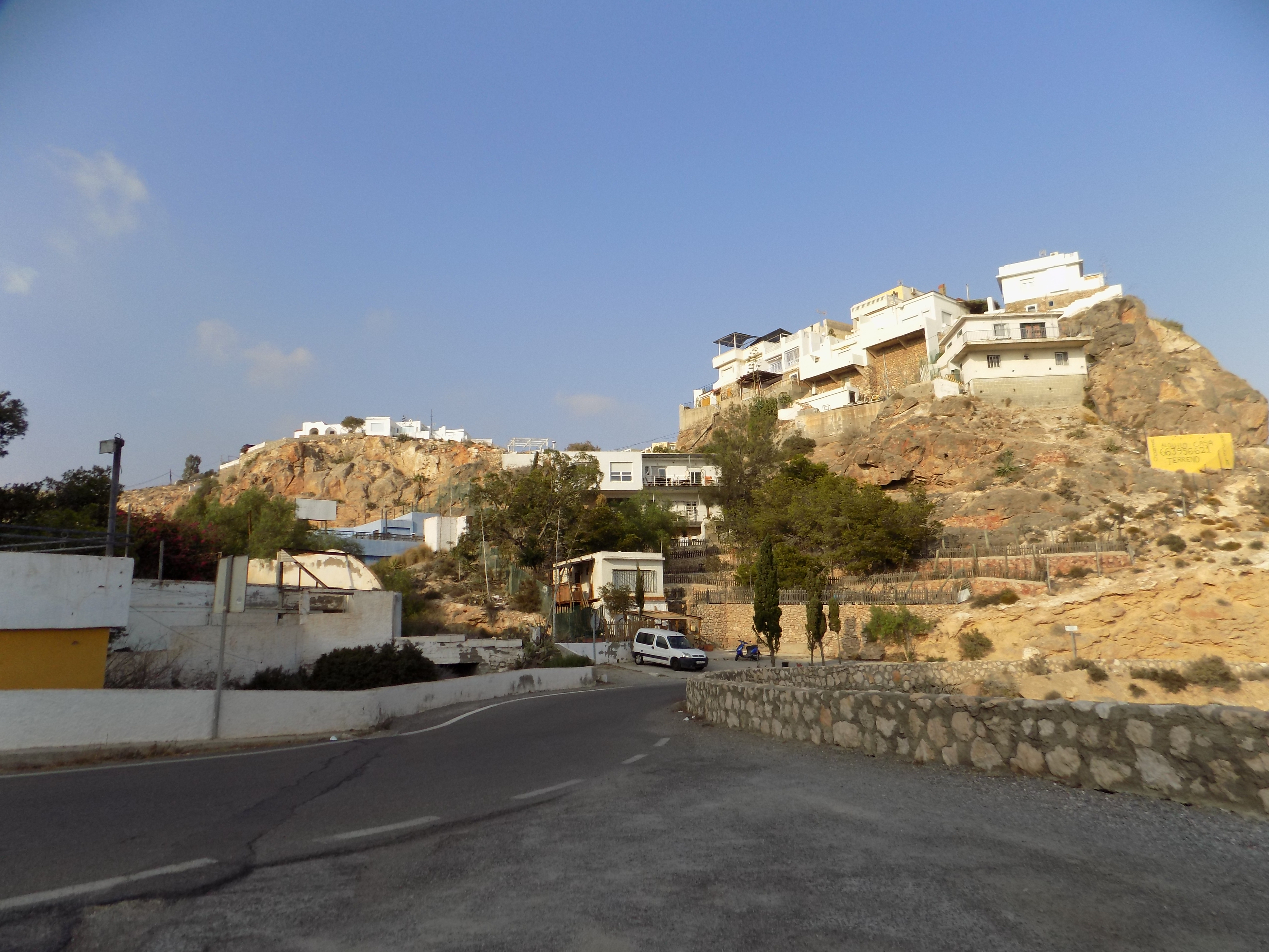 Vista de Castell del Rey